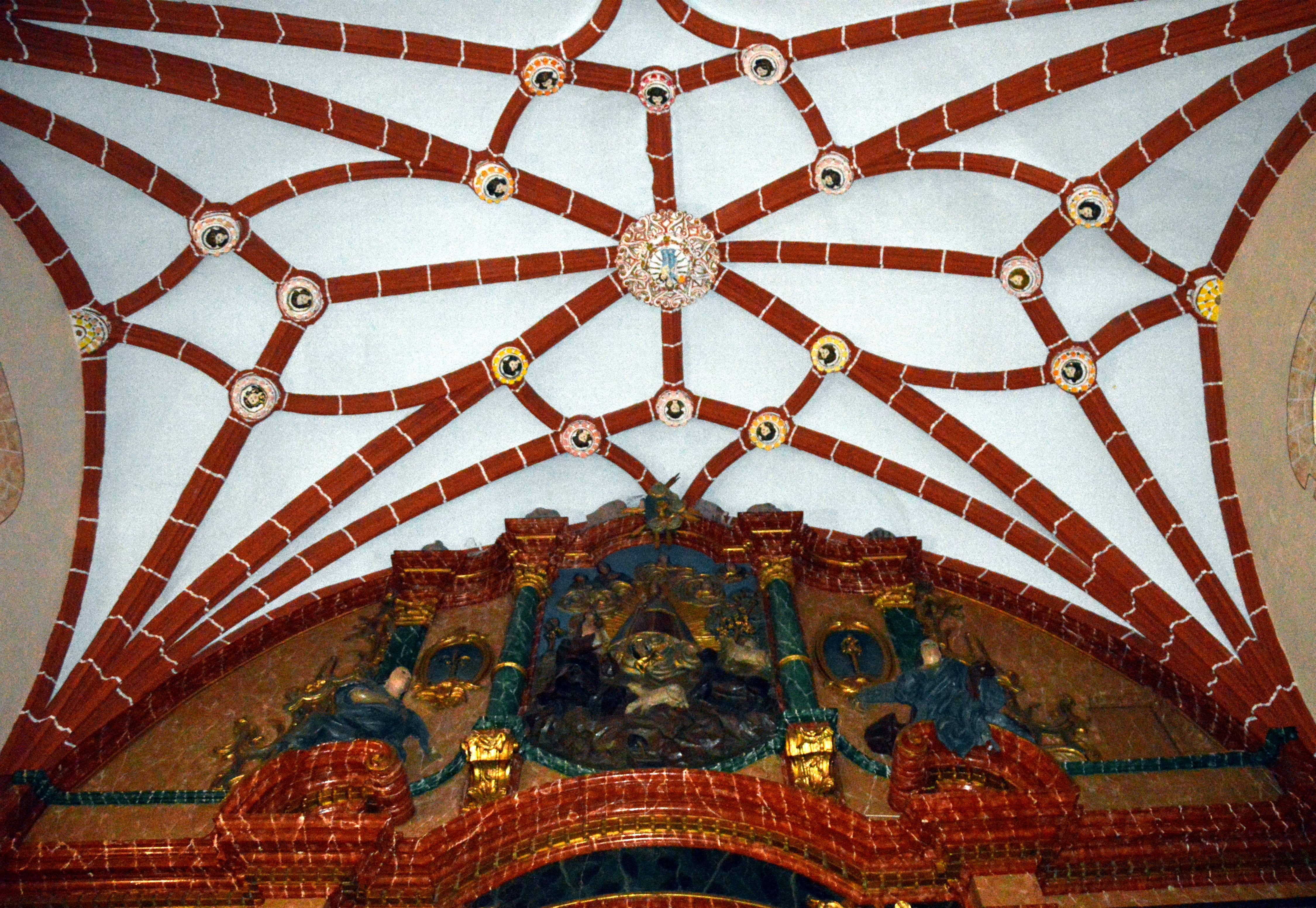 Santuario de la Fuensanta en Villel (Teruel), detalle de la tracería gótica sobre el frontal del presbiterio (2019).